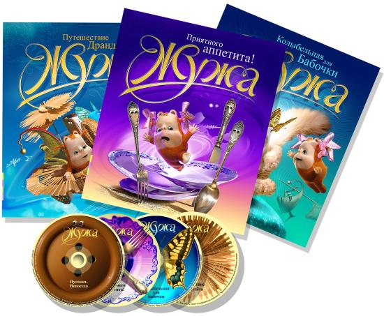 Обложки книг «Жужа».